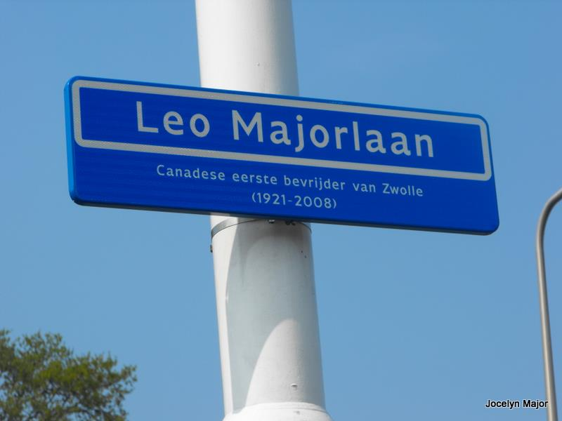 Le panneau de l'avenue Léo Major (Leo Majorlaan) dans la ville de Zwolle aux Pays-Bas. Panneau nommé en l'honneur de Léo Major le libérateur de la ville de Zwolle le 14 avril 1945.